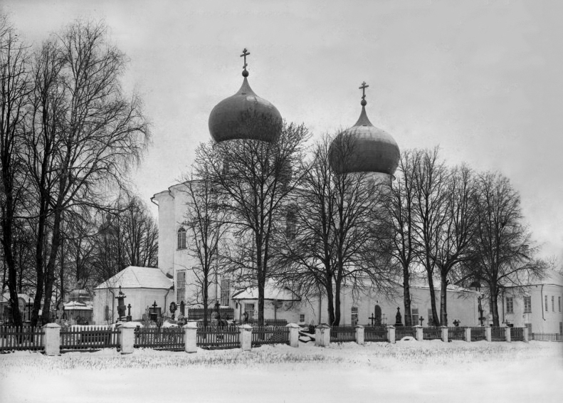 Некрополь Антониева монастыря начало ХХ в.